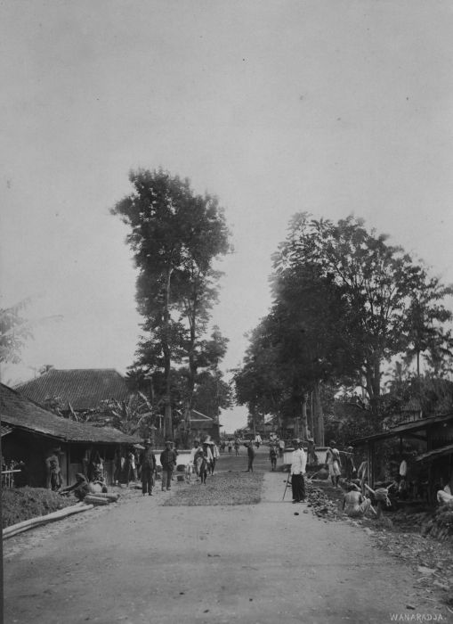 Foto. Straatgezicht in het dorp Wanaradja in de Preanger